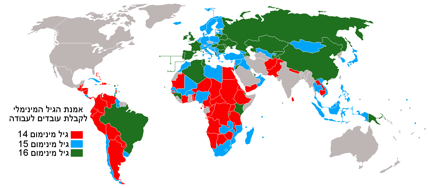 גיל מינימאלי לקבלת עובדים לעבודה